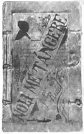 Cubierta de Noli me tangere de José Rizal